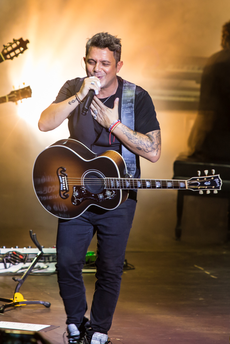 Alejandro Sanz en los conciertos de Cap Roig 2016